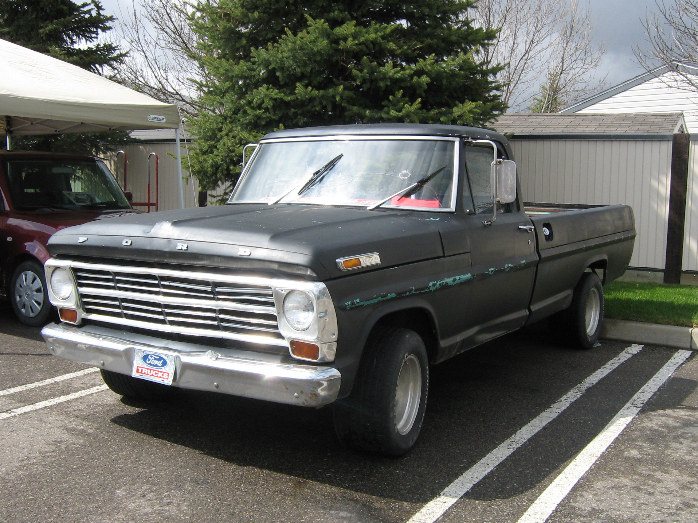 1968 Ford Truck